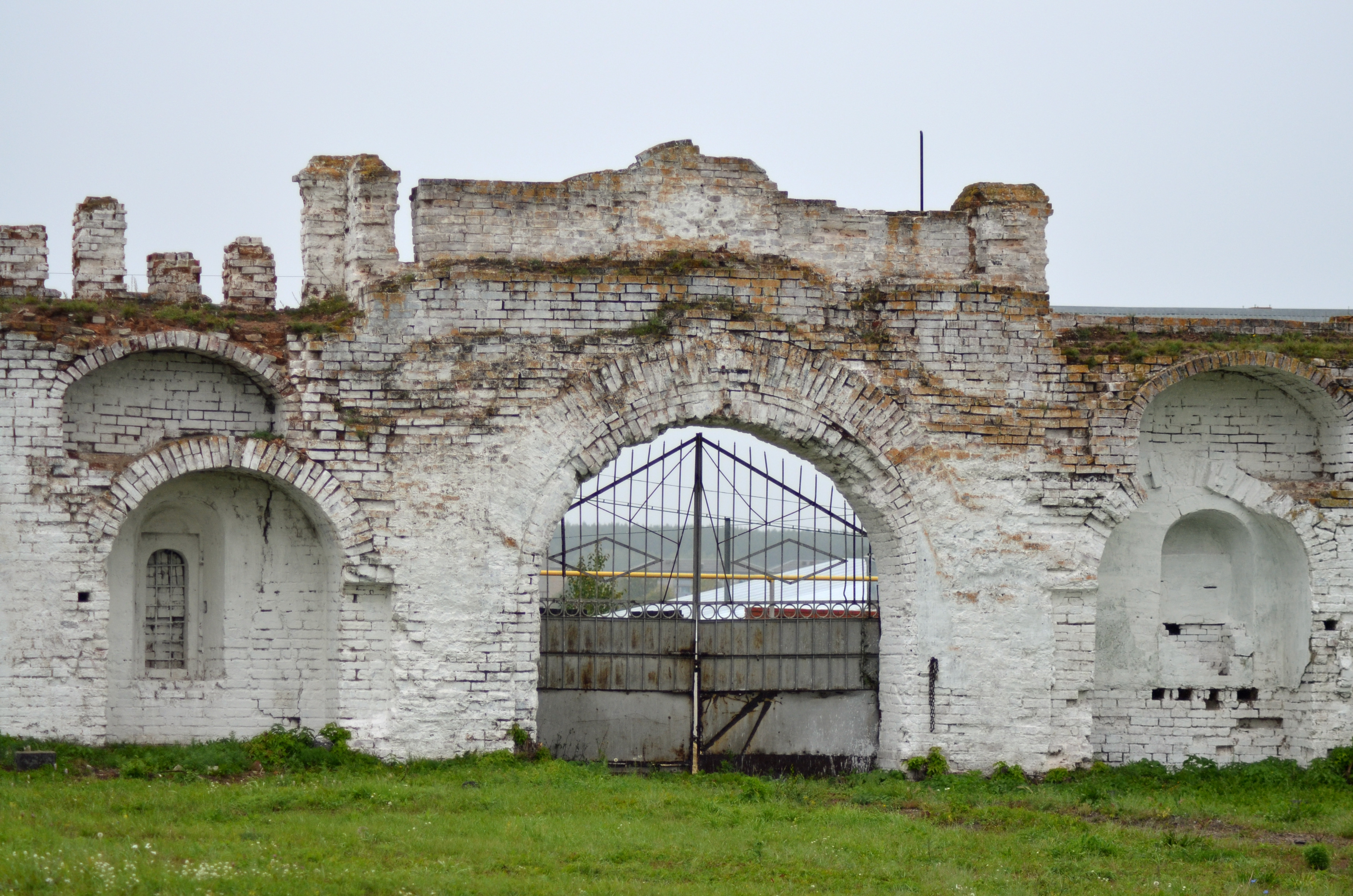 Красный бастион (башня западная) (руины) (Курганская область, Далматово, улица Советская, 63)